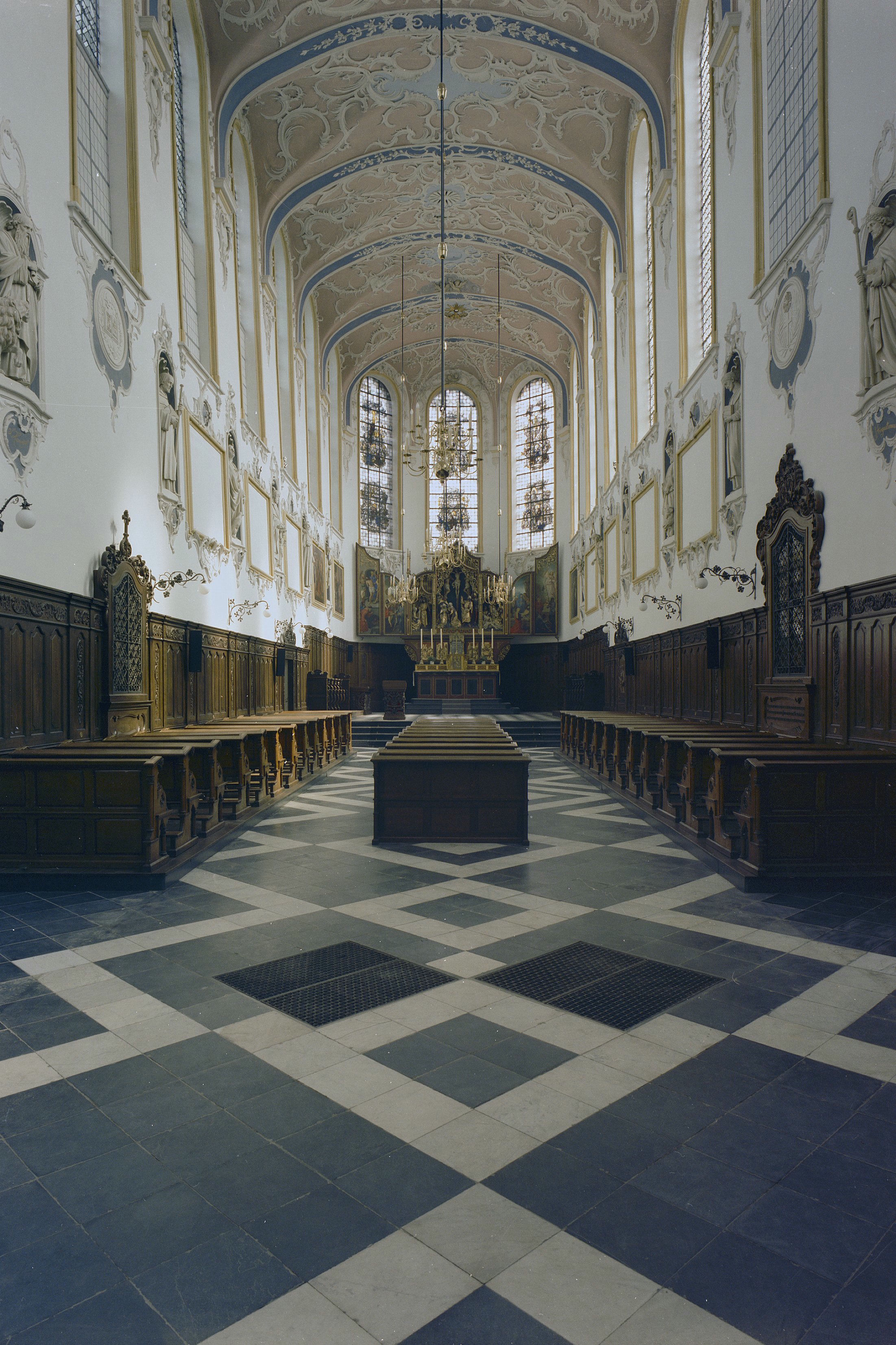 Karthuizerklooster (Groot Seminarie): INTERIEUR, CAROLUSKAPEL, OVERZICHT NAAR HET OOSTEN (opmerking: Gebruikt voor Monumenten In Nederland Limburg, bladzijde 303)